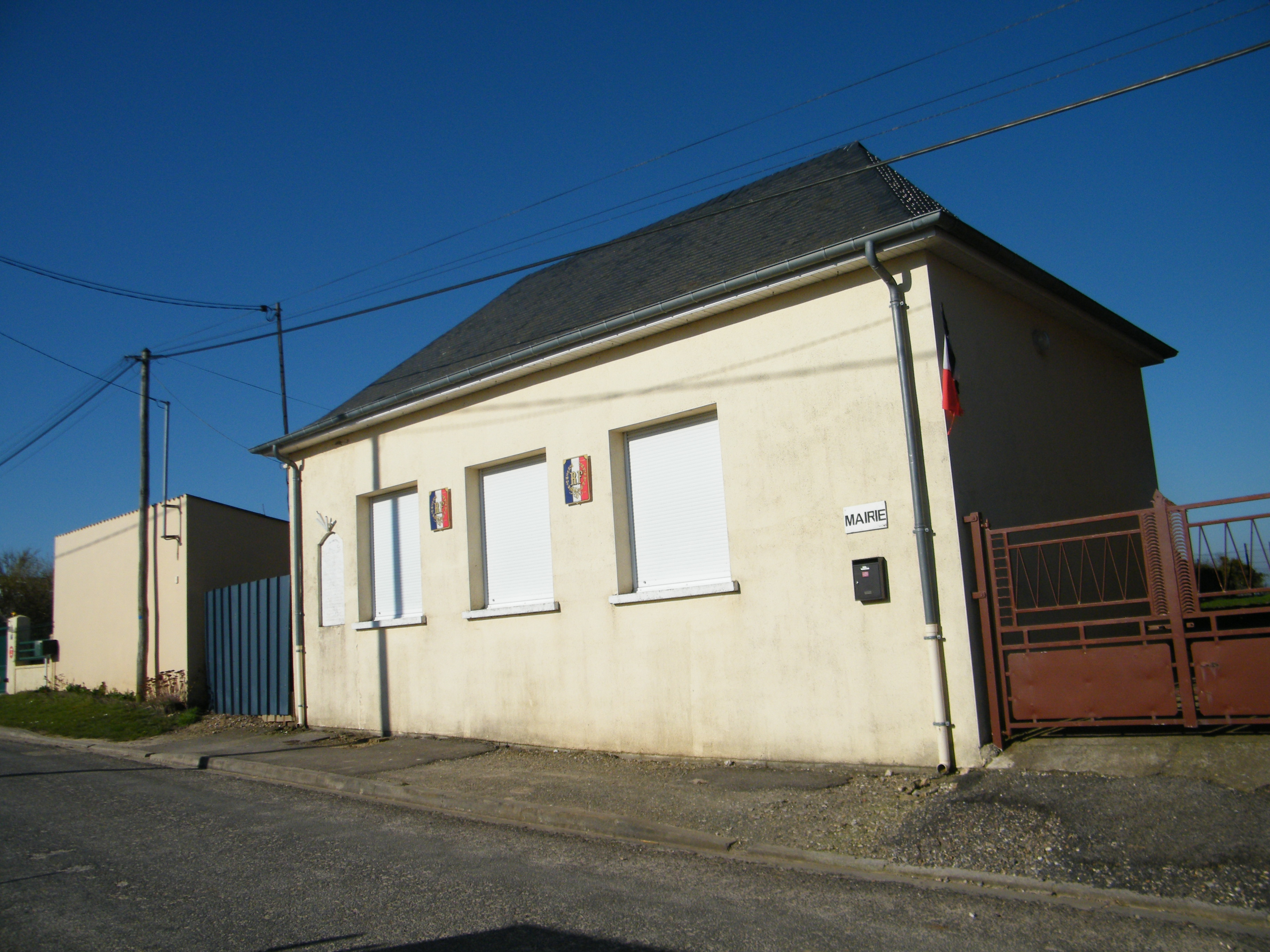 La mairie.